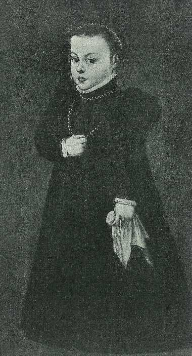 Izabela Jagiellonka